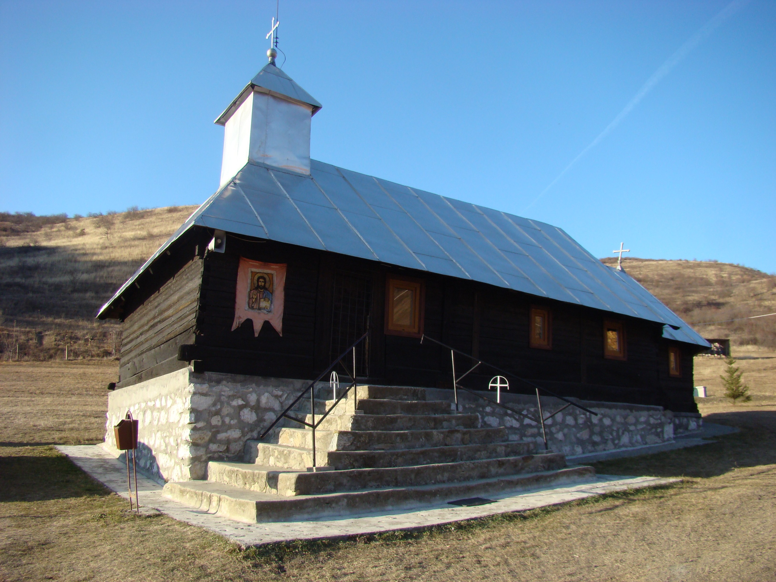 Biserica de lemn din Șilea mutată la Mănăstirea Fărău